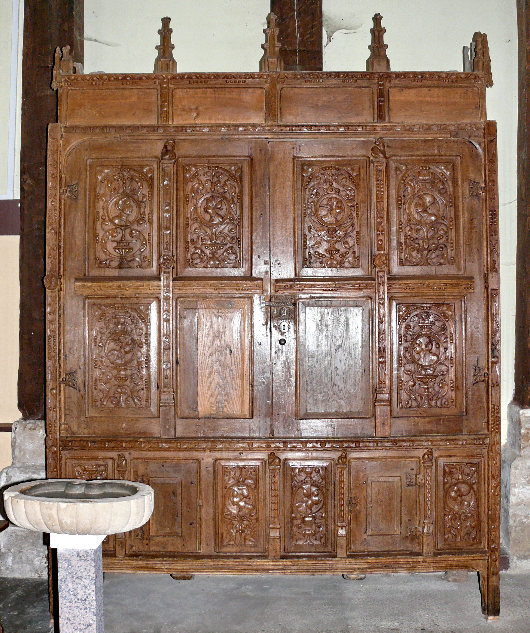 Marseille-en-Beauvaisis (Oise - Picardie - France) : Armoire sculptée de l'église Saint-Martin